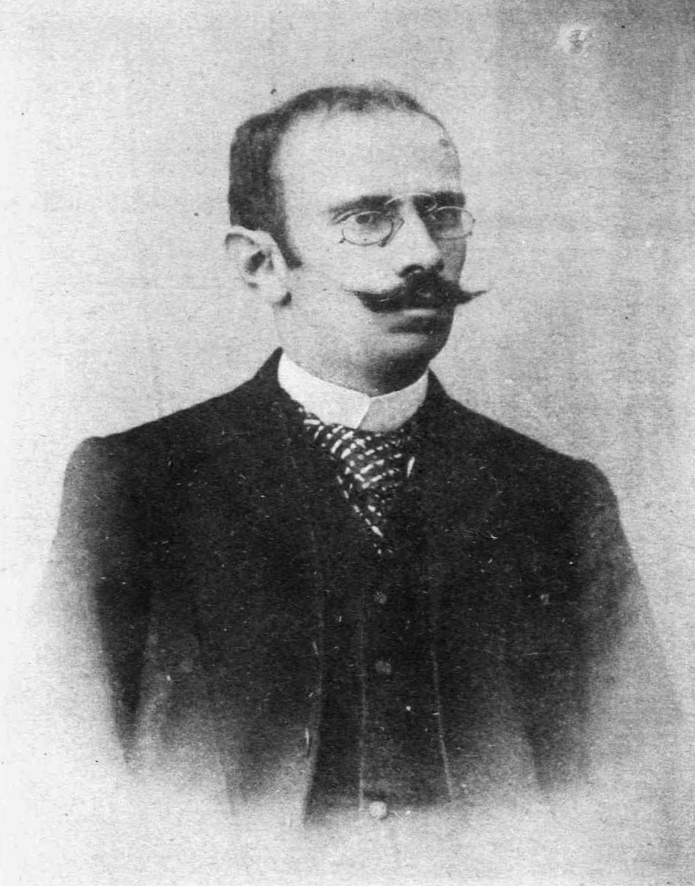 Griechischer Dichter, 19. Jahrhundert